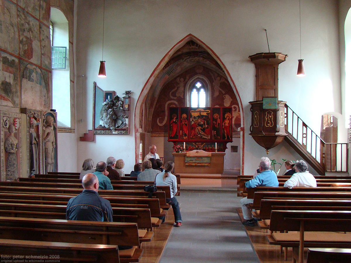 Innenansicht der Notburgakirche in Haßmersheim-Hochhausen beim Tag des offenen Denkmals 2008